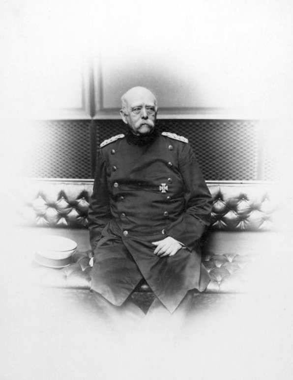 Otto von Bismarck Porträt Otto Eduard Leopold von Bismarck-Schönhausen in Uniform Abgebildete Personen: Bismarck, Otto von Fürst: Reichskanzler, Deutschland (GND 11851136X)